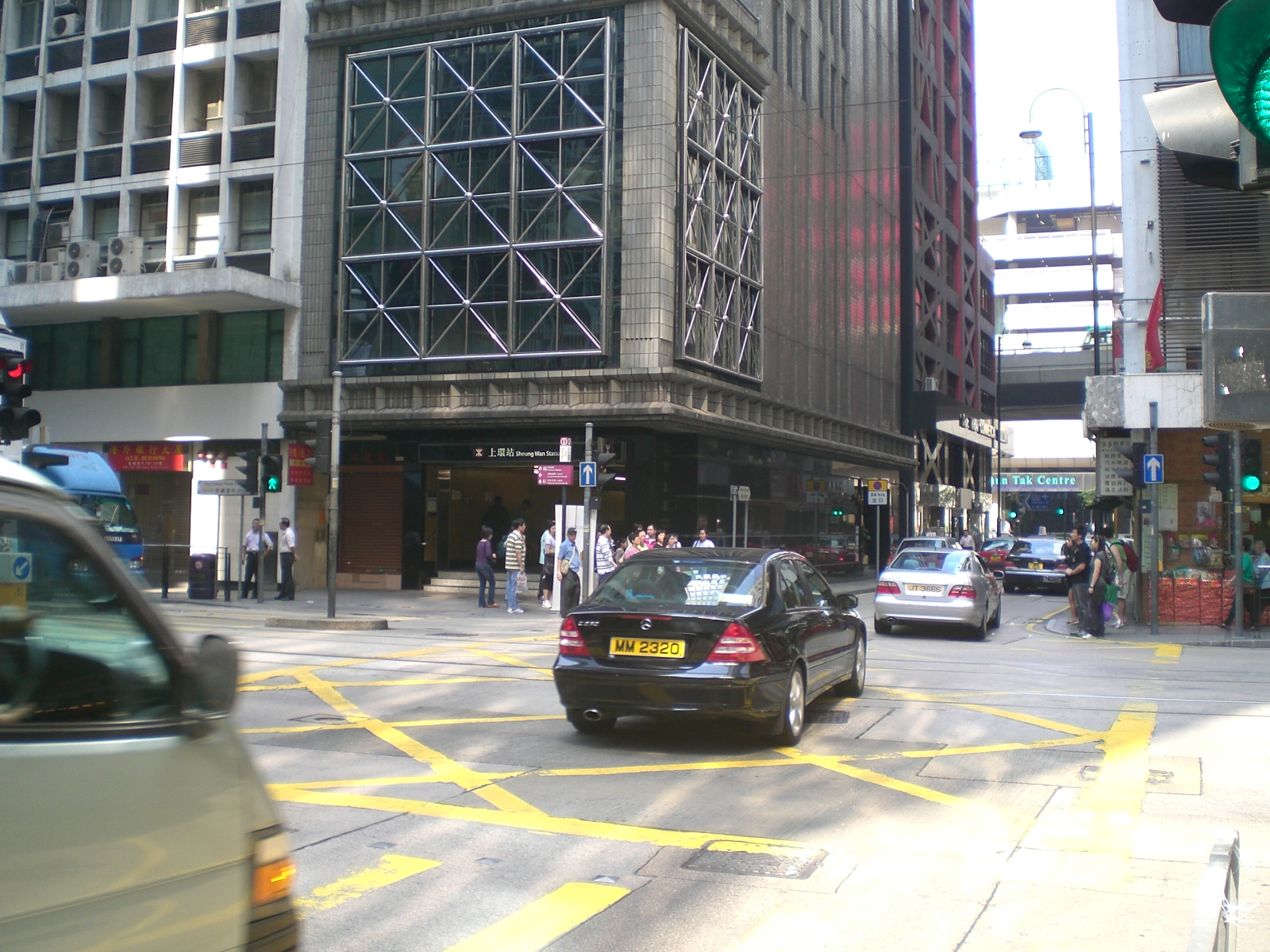 禧利街, 中西區, 上環, Hillier Street, Sheung Wan, Hong Kong